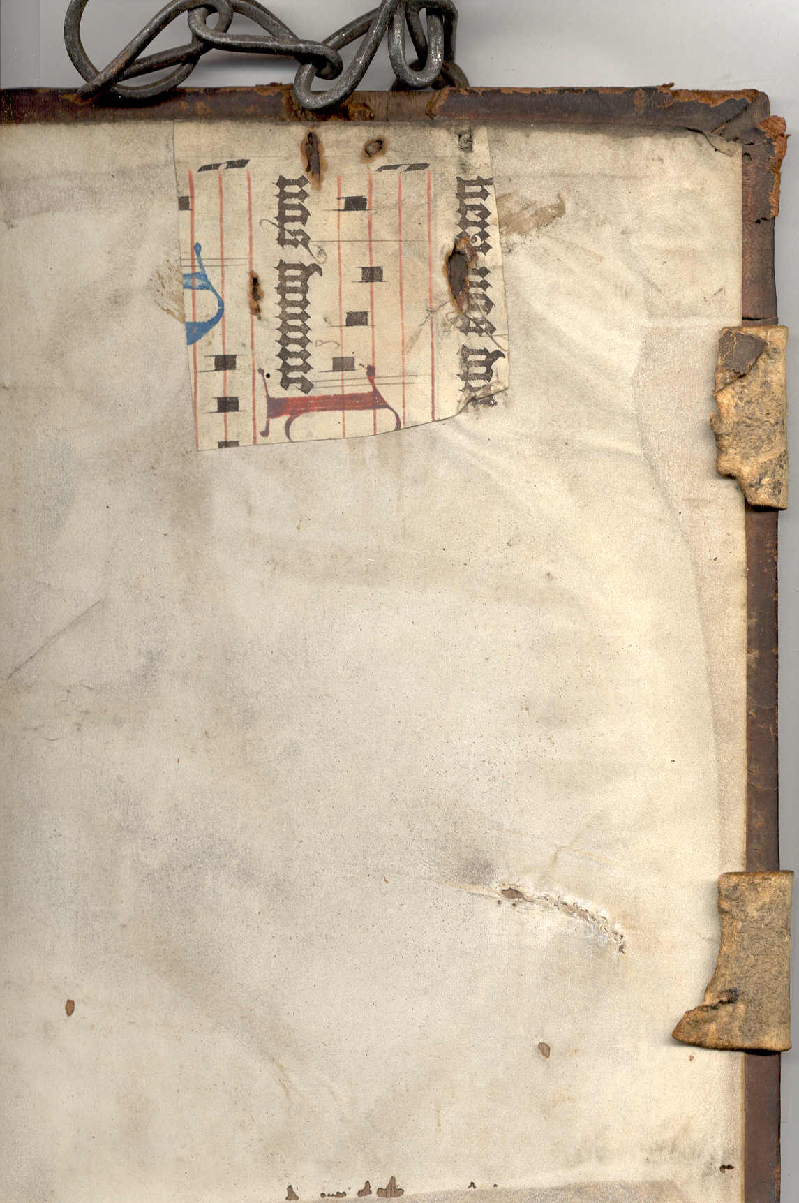 Notenblatt-Fragment als Flicken im Rückdeckel eines Inkunabelbands (Kettenbuch)